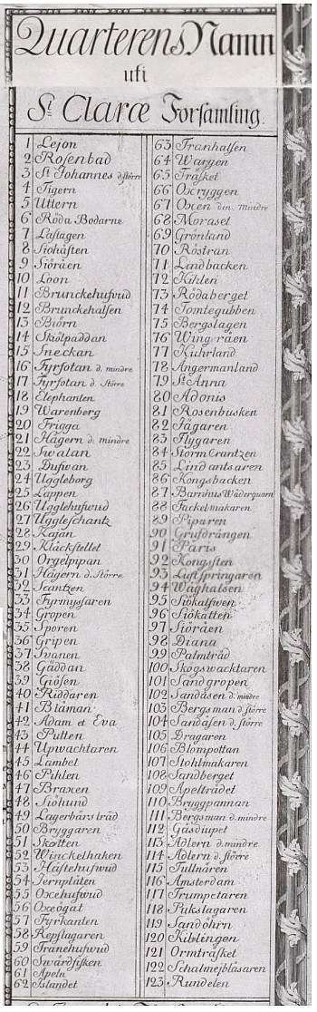 Petrus Tillaeus "General Charta öfwer Stockholm med Malmarne Åhr 1733", förteckning av kvarter i Clara församling på Norrmalm.